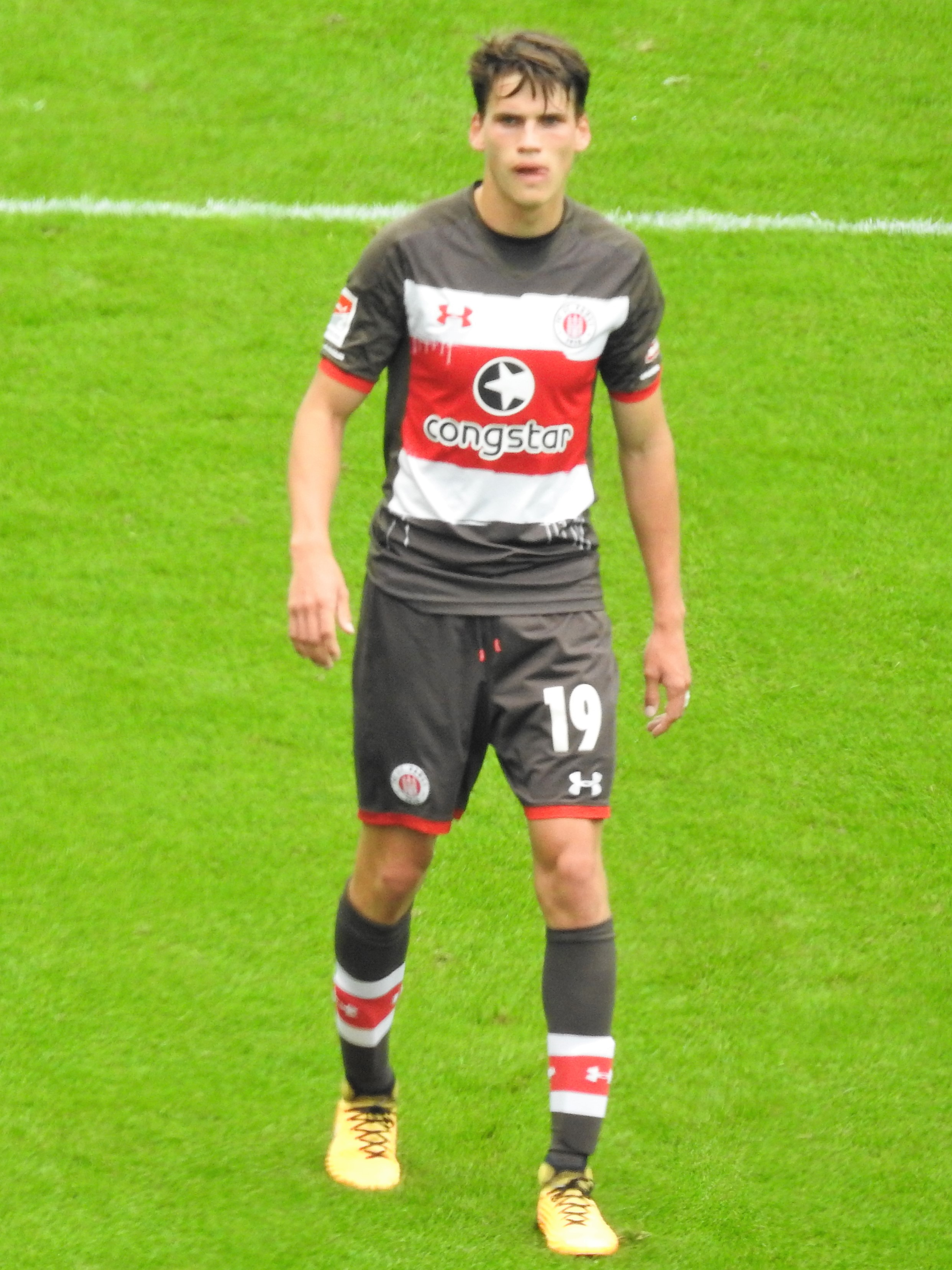 Zander, Luca FCSP